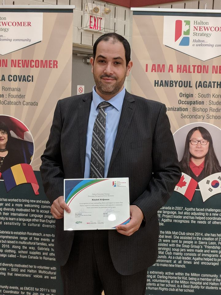 KHALED ALQAZZAZ